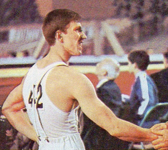 MUNCHEN/MONACO '72-PANINI-Figurina n.227- KLIMENKO - URSS